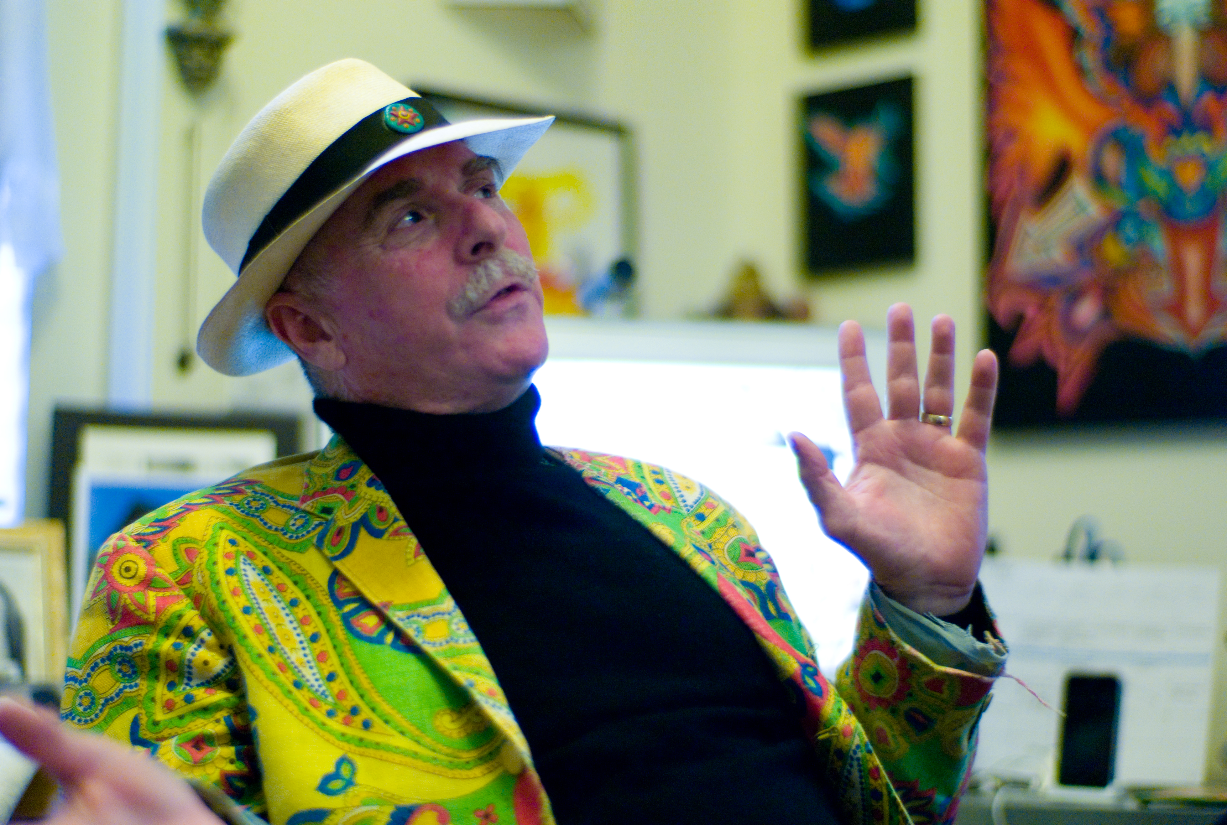 Howard Rheingold